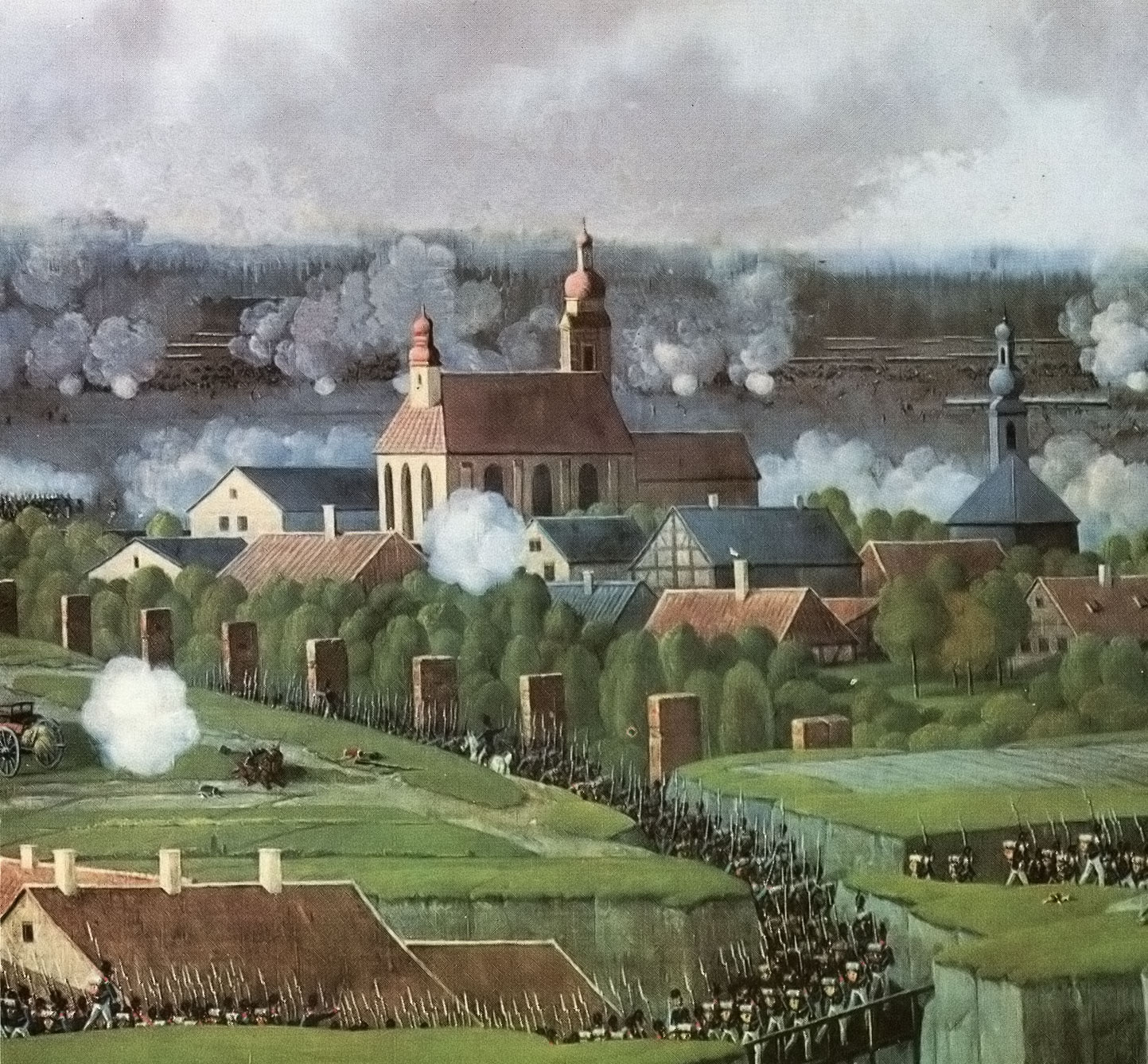 Беларуская (тарашкевіца): Полацак (Połacak), прадмесьце Спас (Spas). Царква Сьвятога Спаса да маскоўскай перабудовы